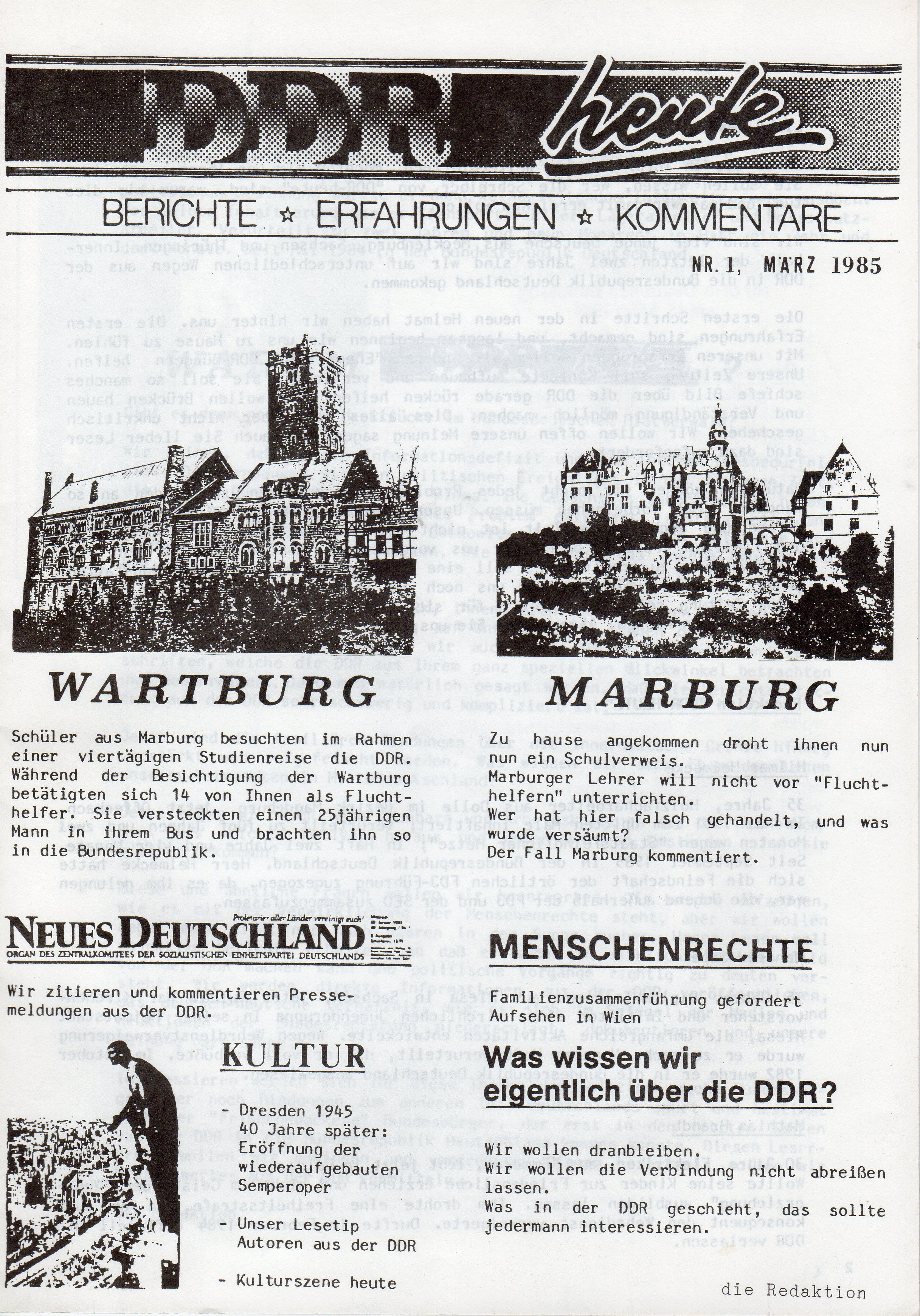 Erstausgabe